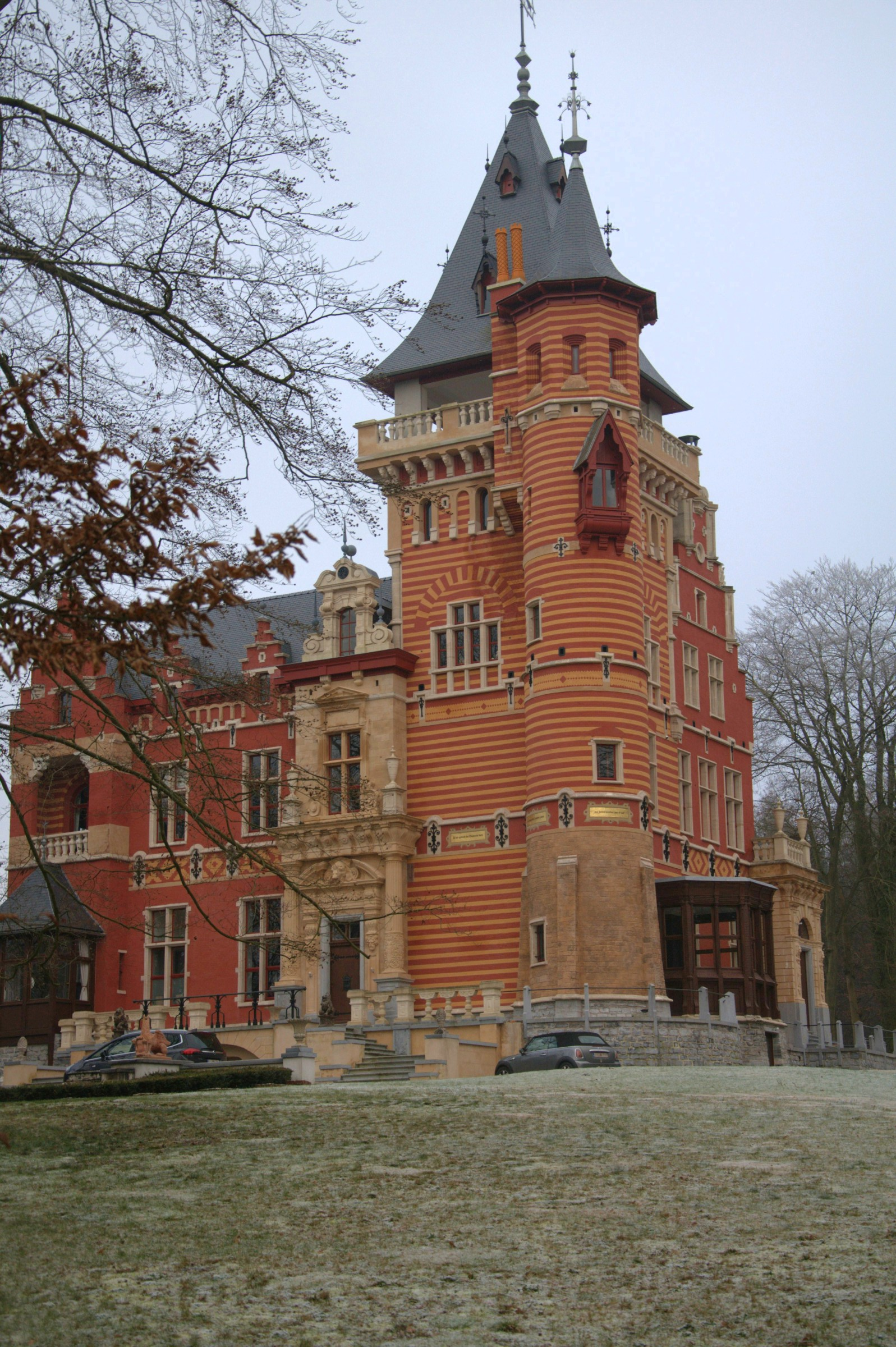 monuments classés de watermael boitsfort